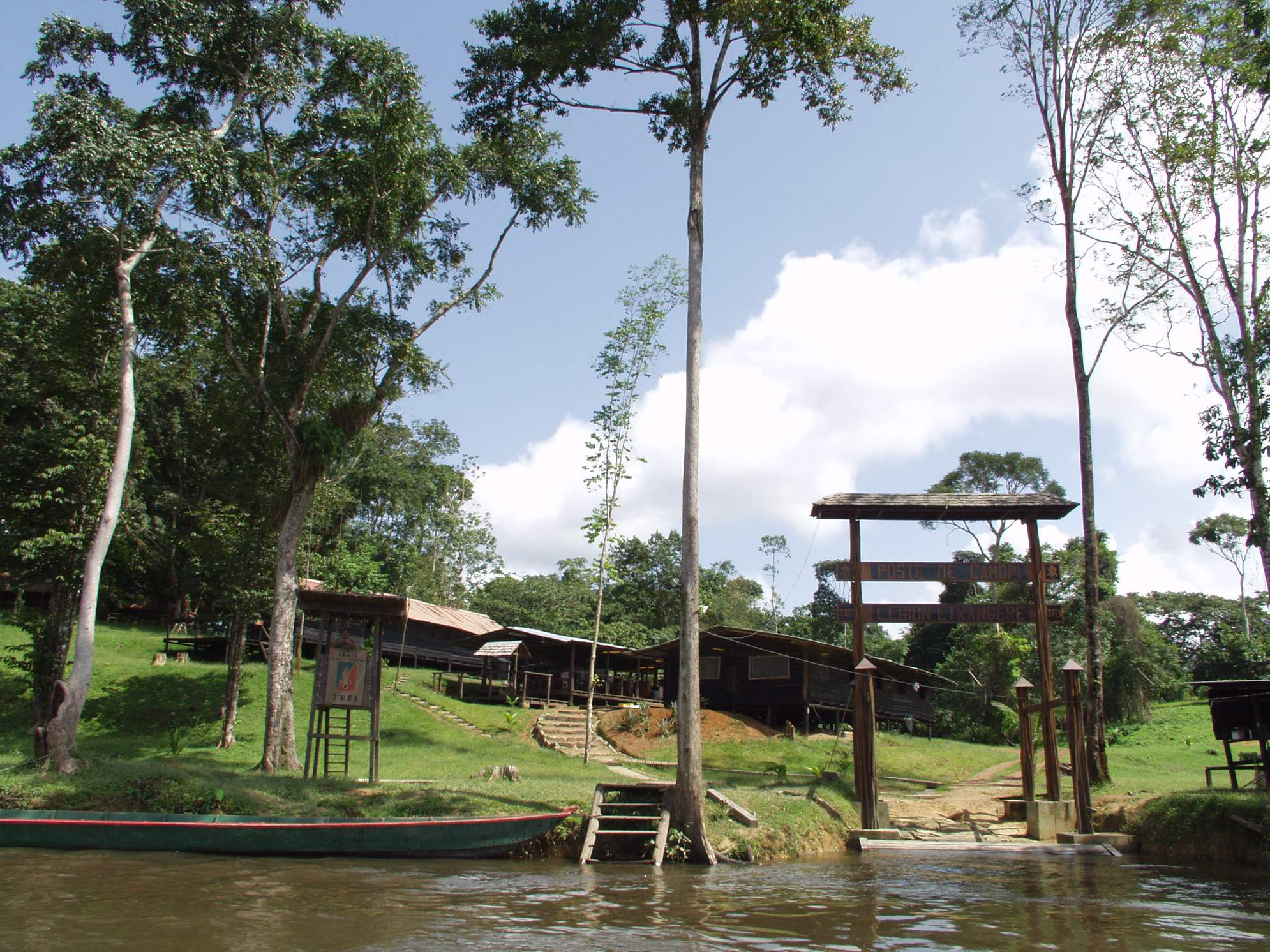 Entrée du quartier légion de Camopi (emprise du 3e régiment étranger d'infanterie) en Guyane (France)